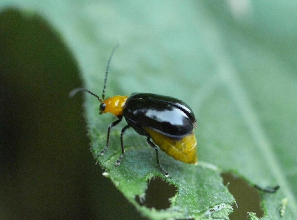 2008/08/04 和歌山県田辺市：Tanabe City. Wakayama Pref. Japan